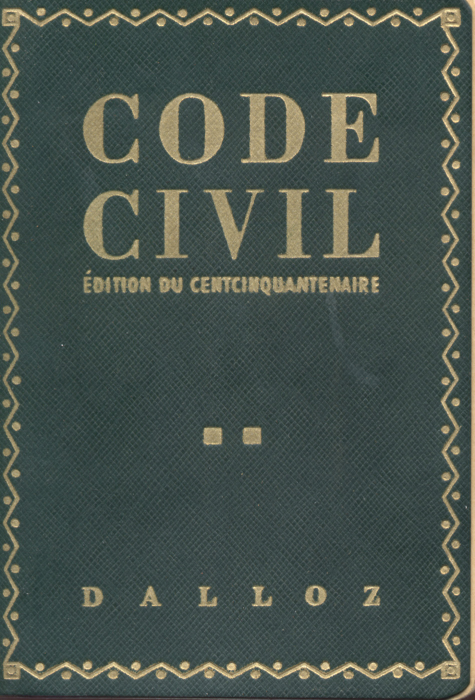 Code civil. Paris: Dalloz